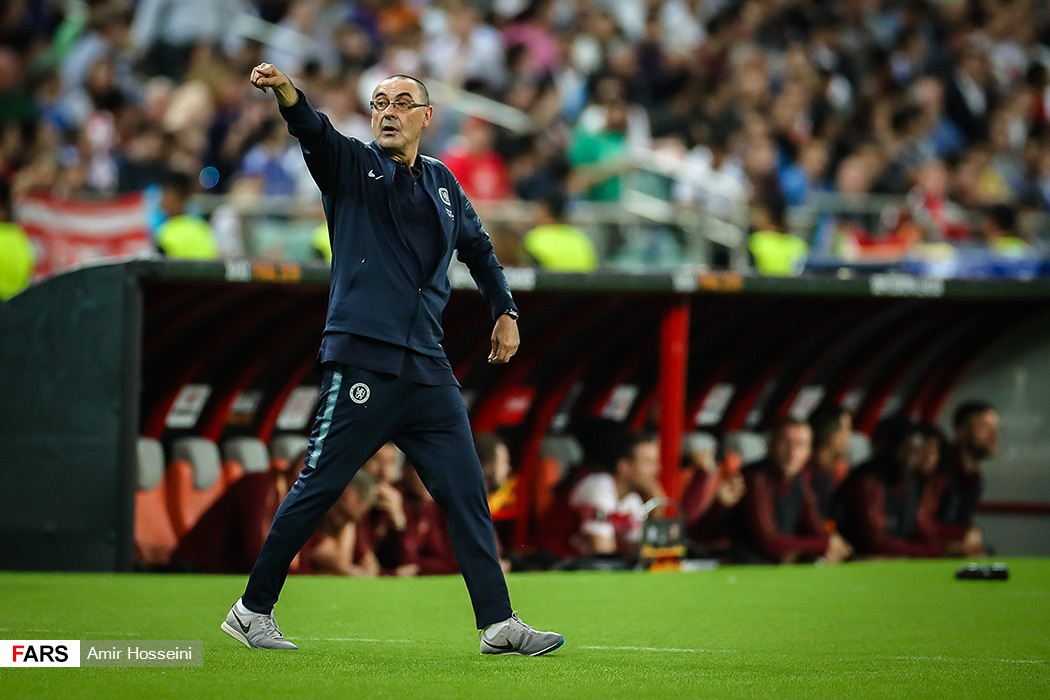 مسابقه چلسی و آرسنال، فینال لیگ اروپا ۲۰۱۹